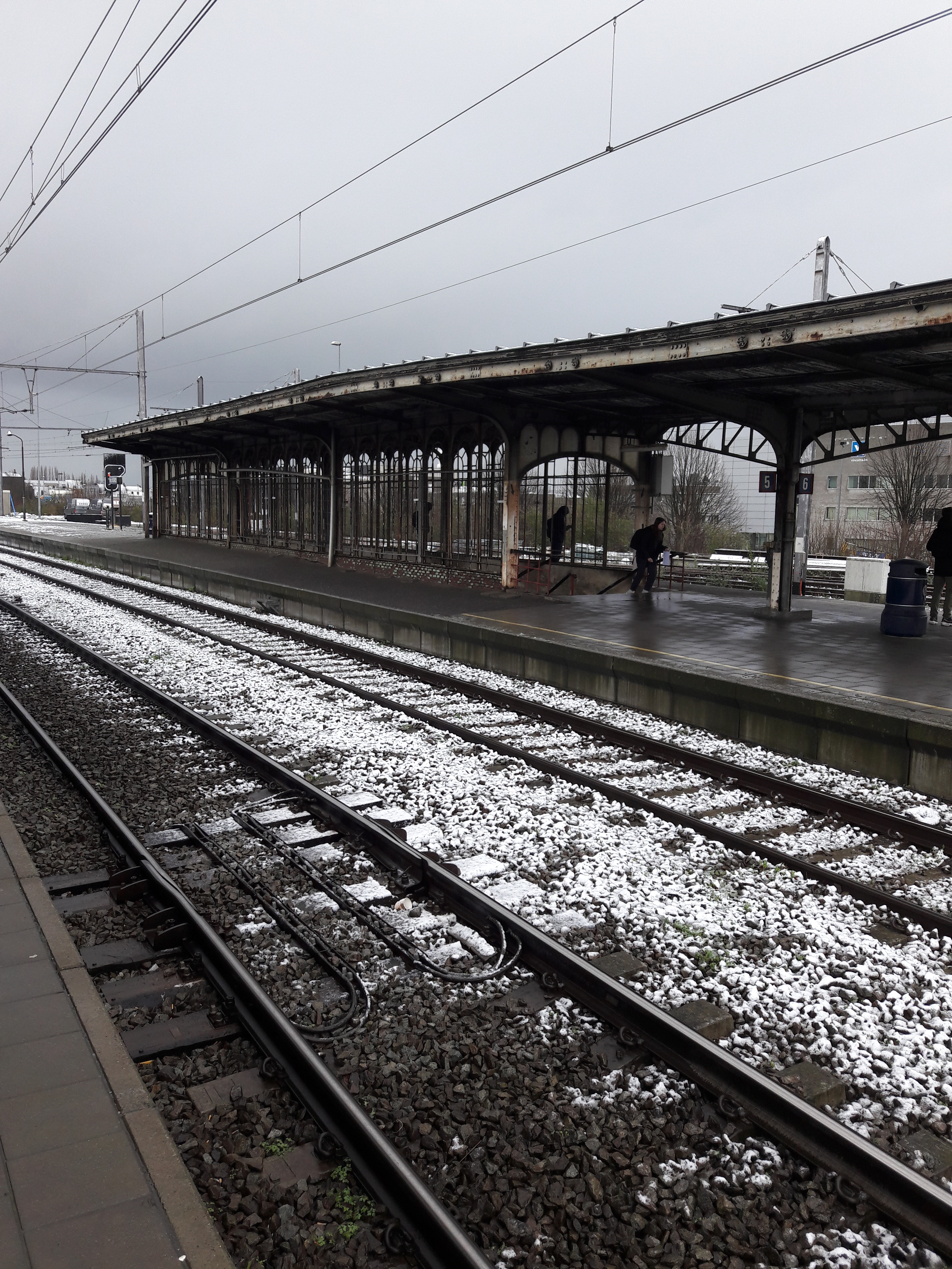 Station Vilvoorde tijdens de wintermaanden.